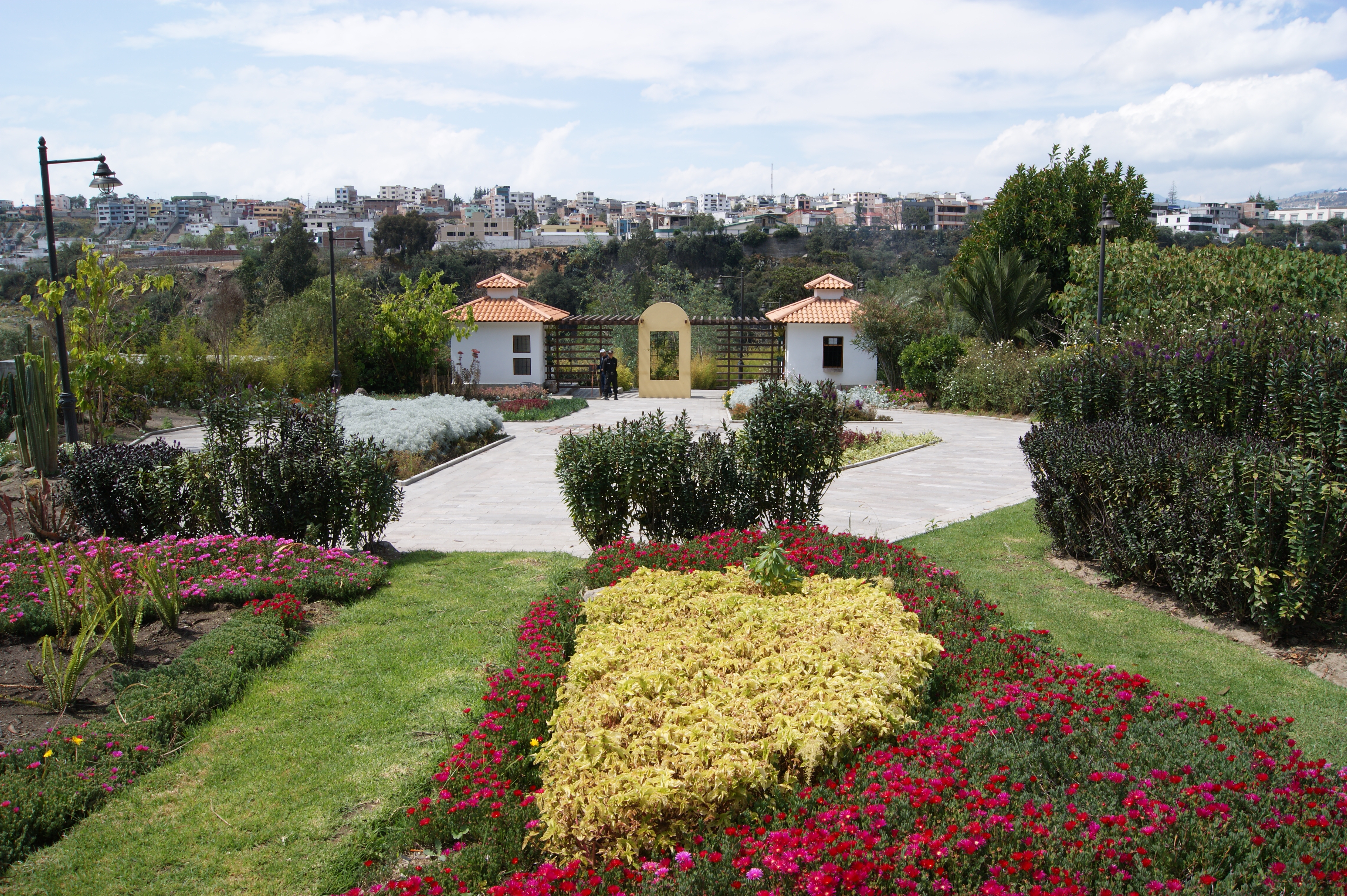 Boleterias